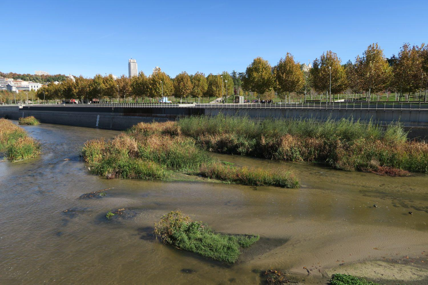 El Ayuntamiento de Madrid se suma a los actos del Día Mundial de los Humedales, que se celebra este viernes 2 de febrero, con la realización de varios itinerarios guiados que darán a conocer durante el fin de semana el estado del río Manzanares tras el inicio de los trabajos de renaturalización que se están llevado a cabo con la colaboración de Ecologistas en Acción. Además, para recoger y difundir toda la riqueza y variedad de aves que habitan y visitan el río desde que se abrieron las compuertas, en agosto de 2016, el Área de Medio Ambiente y Movilidad está elaborando una Guía de Aves de Madrid Río.